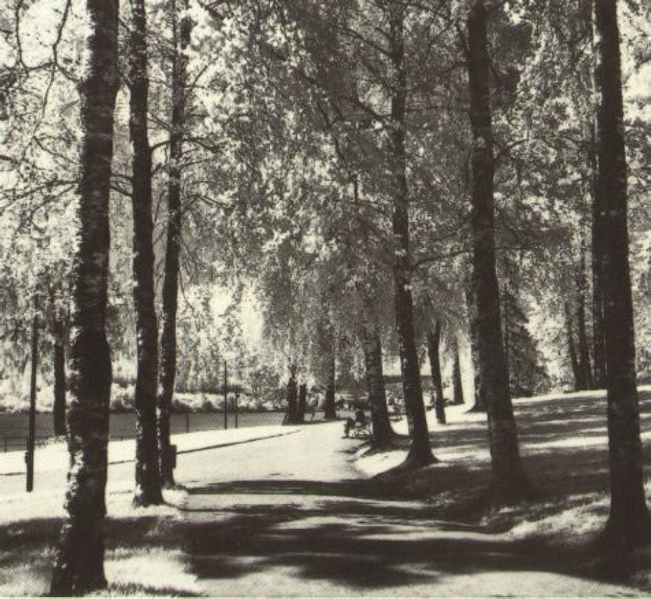 Jyväskylän Rantapuiston Kulttuuri Miljöö, kuva Jussi Jäppisen kokoelmista